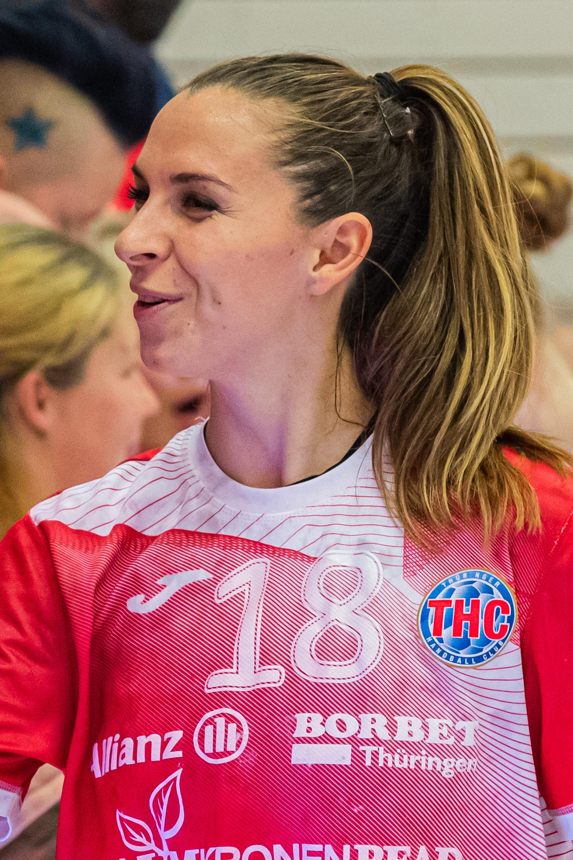 Handball, 1. Bundesliga Frauen, Thüringer HC - Buxtehuder SV; Iveta Koresova (Iveta Luzumova, Thüringer HC, 18)